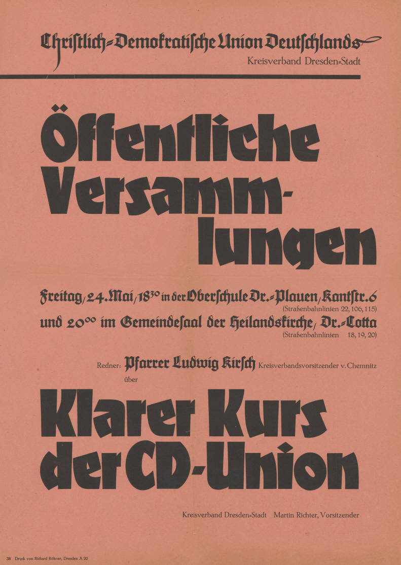 Christlich-Demokratische Union Deutschlands Kreisverband Dresden-Stadt Öffentliche Versammlungen ... Redner: Pfarrer Ludwig Kirsch Kreisverbandsvorsitzender von Chemnitz über Klarer Kurs der CD-Union ...Plakatart:AnkündigungsplakatAuftraggeber:KV Dresden-Stadt, Martin Richter, VorsitzenderDrucker_Druckart_Druckort:38 Druck von Richard Röhner, Dresden A 20Objekt-Signatur:10-024 : 3134Bestand:Plakate aus der SBZ/DDR (10-024)GliederungBestand10-18:Ost-CDU / CDUD / Exil-CDULizenz:KAS/ACDP 10-024 : 3134 CC-BY-SA 3.0 DE